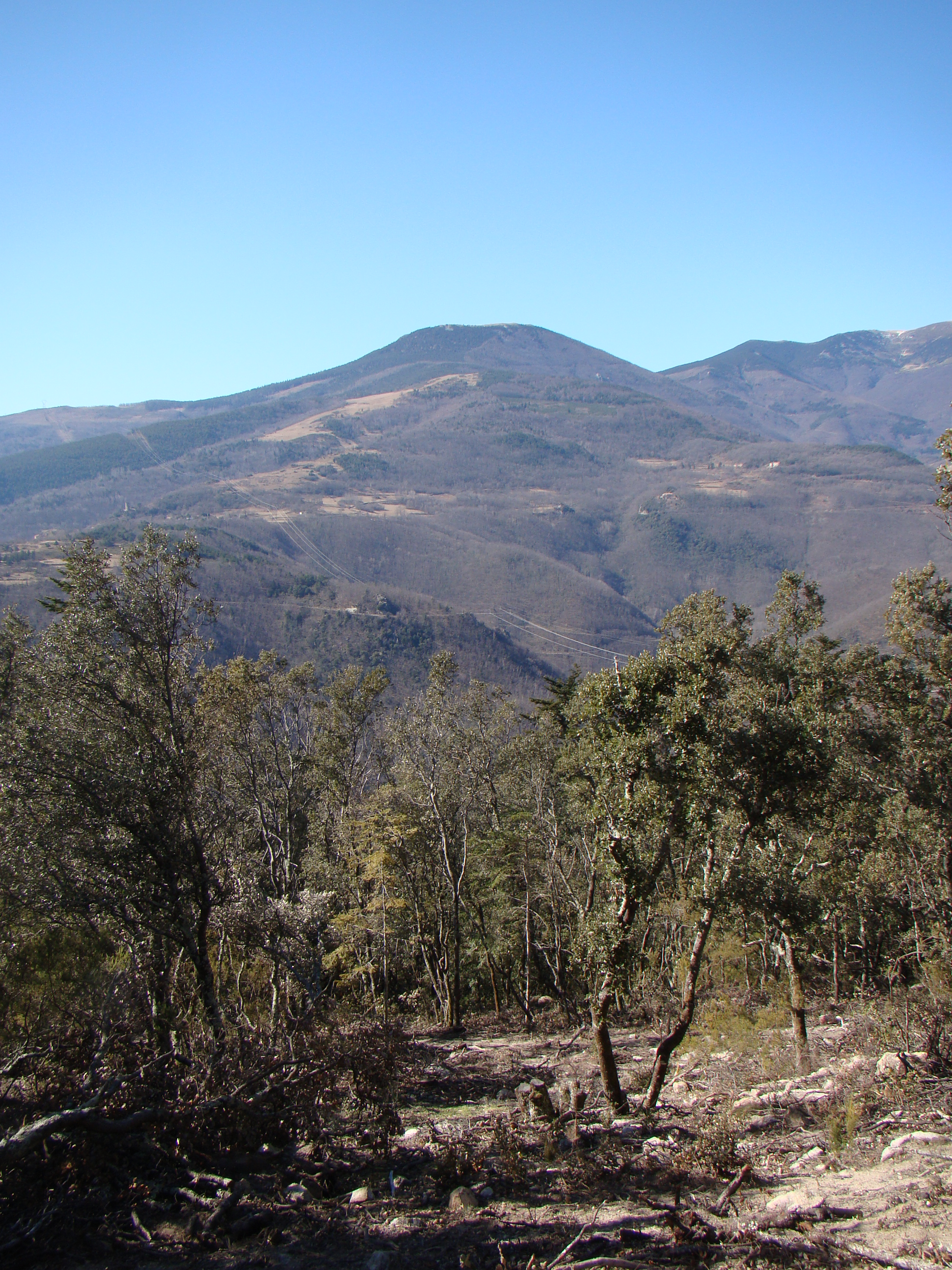 La Souque, vue du dolmen la Caixa de Rotllan